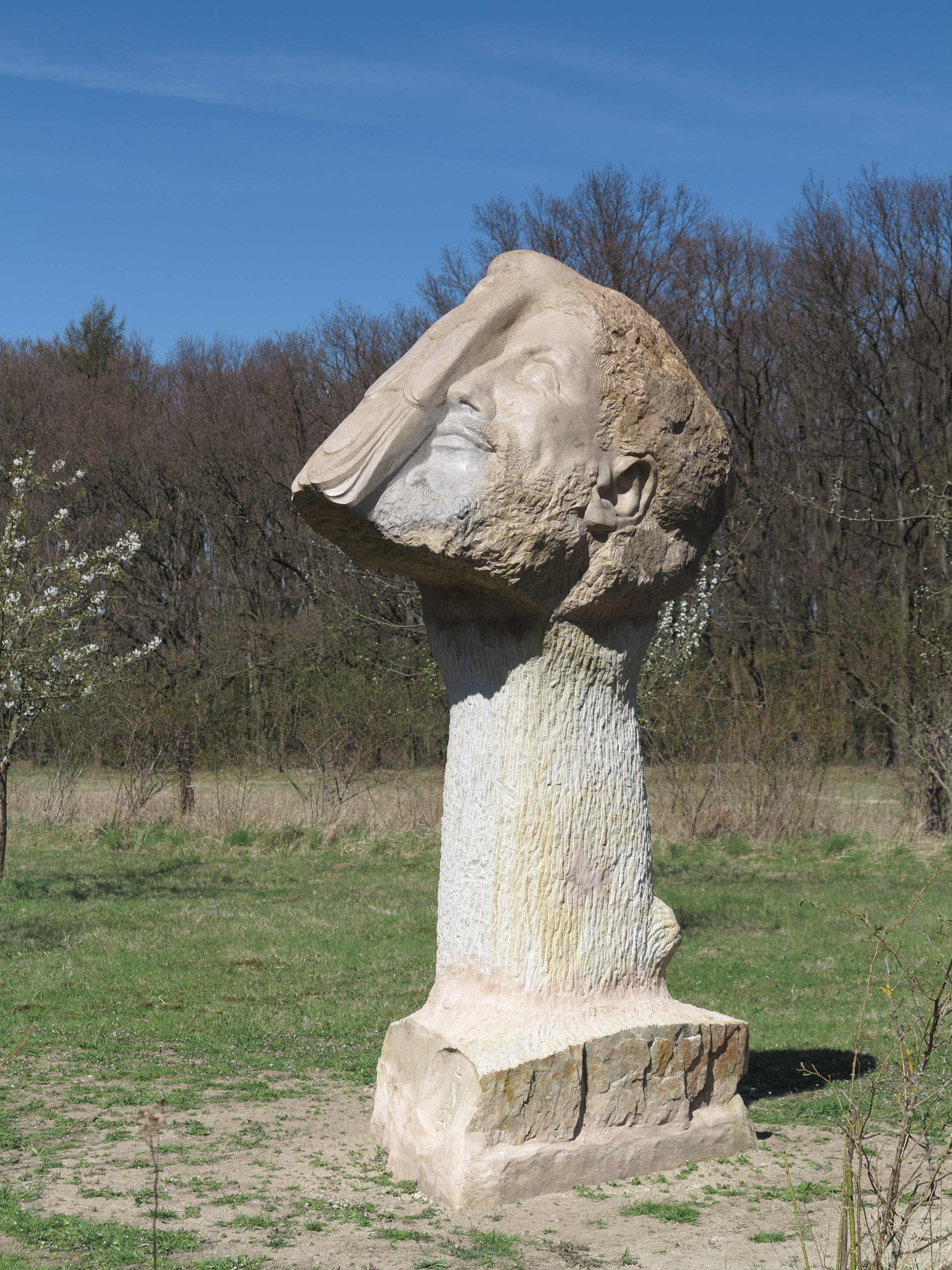 Braunschweig: die Skulptur "Solus Christus" des Braunschweiger Bildhauers Magnus Kleine-Tebbe aus Obernkirchner Sandstein. Höhe: 3,25m. Sie befindet sich am Bienroder See und wurde am 11. Oktober 2014 enthüllt. Der Titel spielt auf einen der vier Glaubenssätze Martin Luthers an.